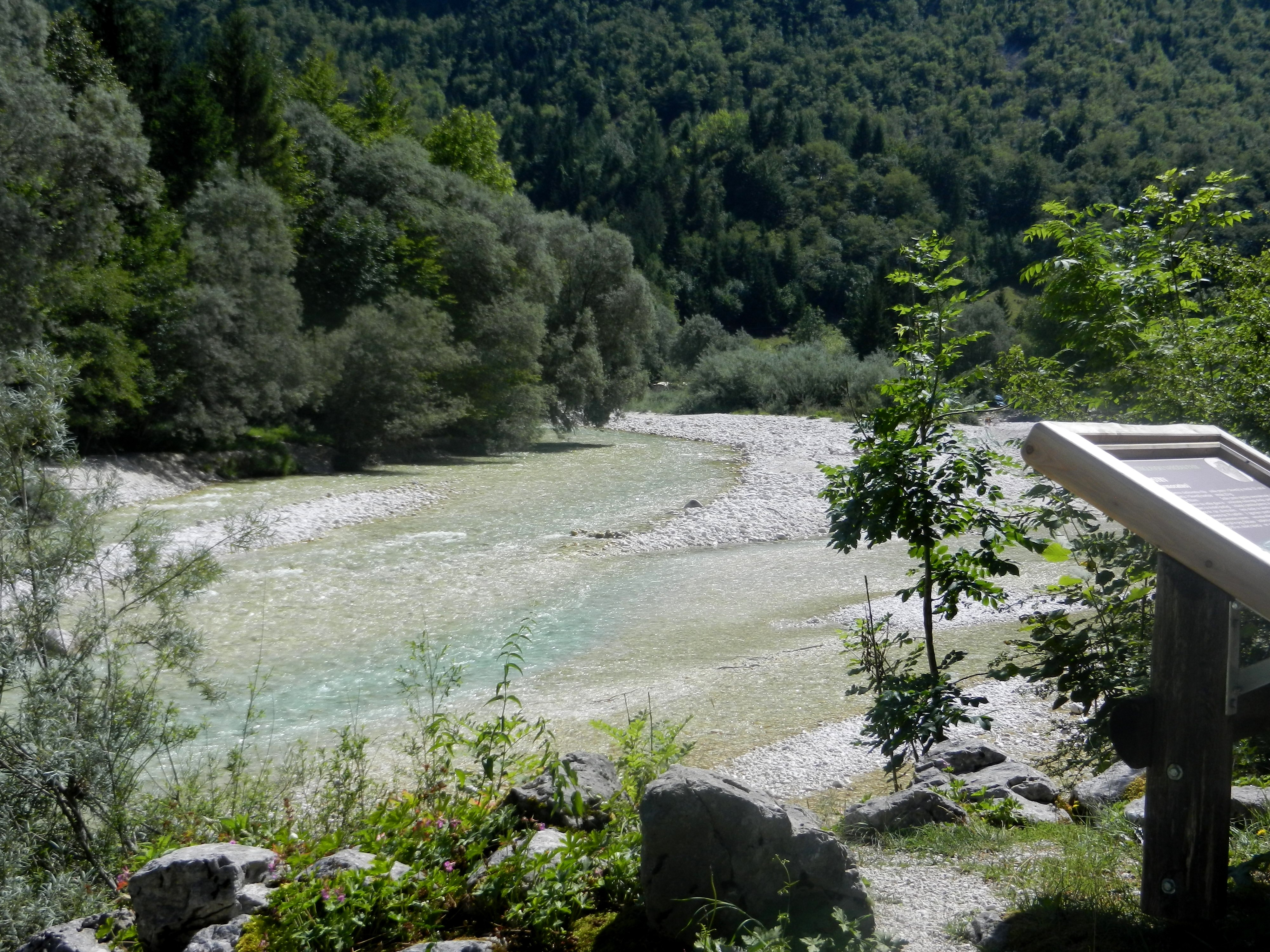 Sotočje Soče in Lepenjice.